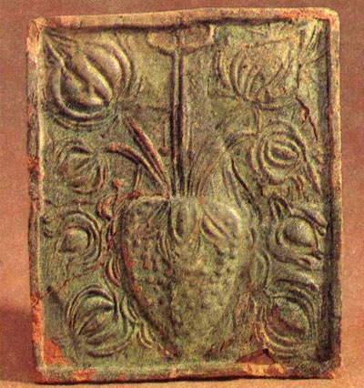 Мсціслаўская кафля. 17 ст.